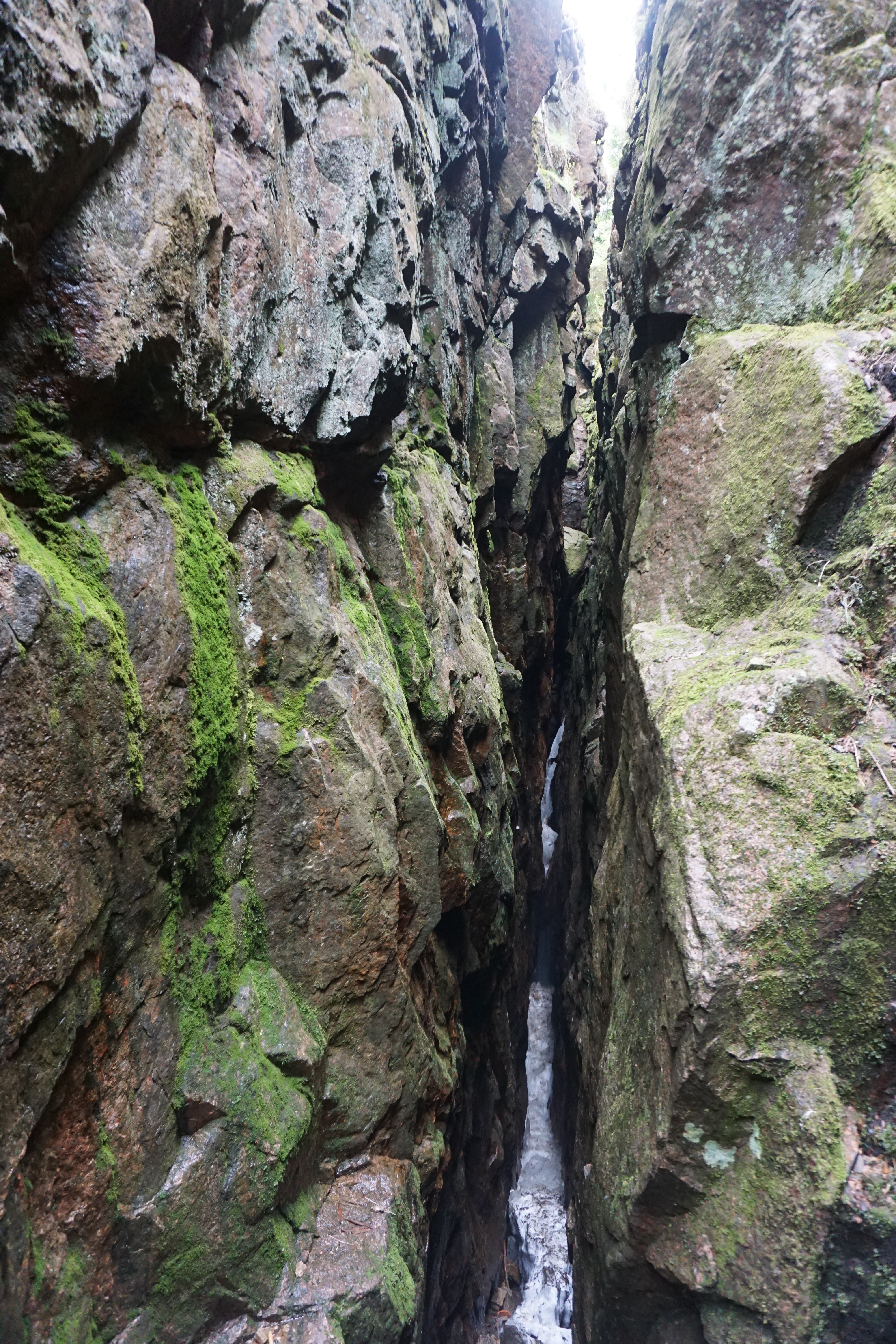 Eispinge zwischen Bergstadt Platten und Plattenberg